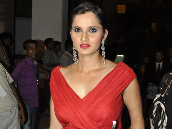 Sania Mirza at Femina Miss India 2010 contest